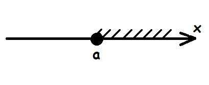 x ir vienāds vai lielāks nekā a